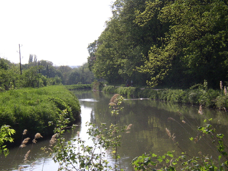 Wiener Neustädter Kanal bei Dornau, Gemeinde Schönau an der Triesting. Der Kanal bildet hier die Grenze zwischen den beiden Gemeindeteilen, Dornau links und Schönau rechts.